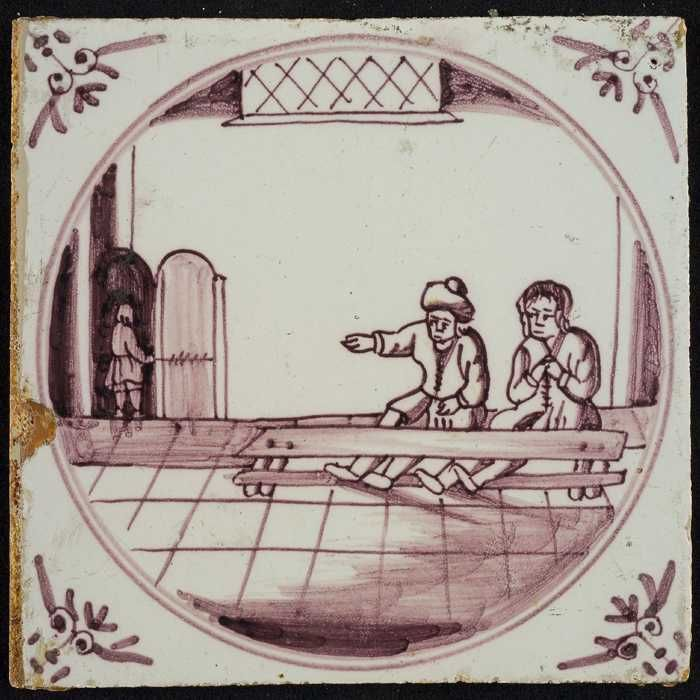 Tafereeltegel, Silas en Paulus zitten met hun benen in een bank geklemd, gevangenbewaarder sluit de deur, hoekmotief ossenkop